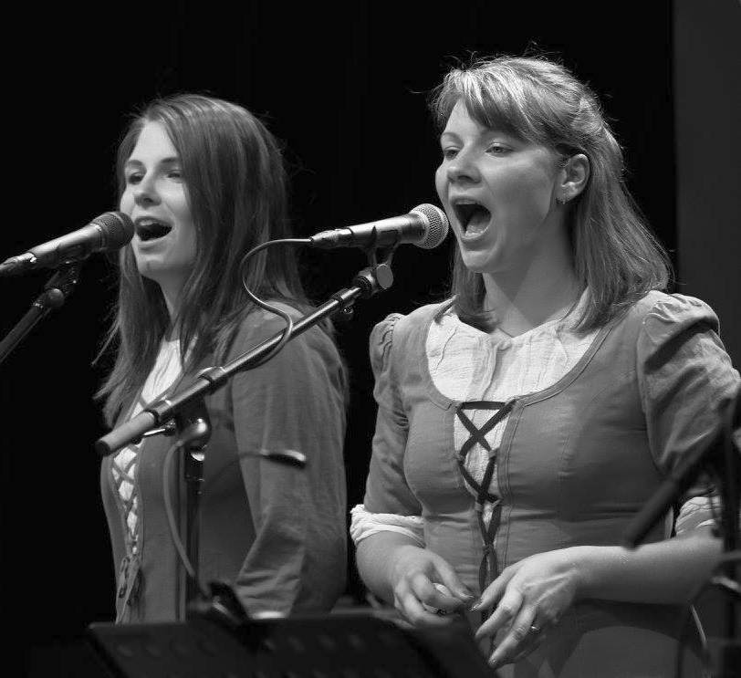 Vaňkovkafest 2016